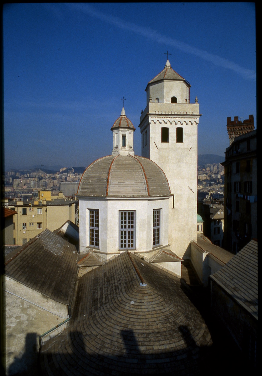 Campanile di S.M. di Castello ripreso dai tetti